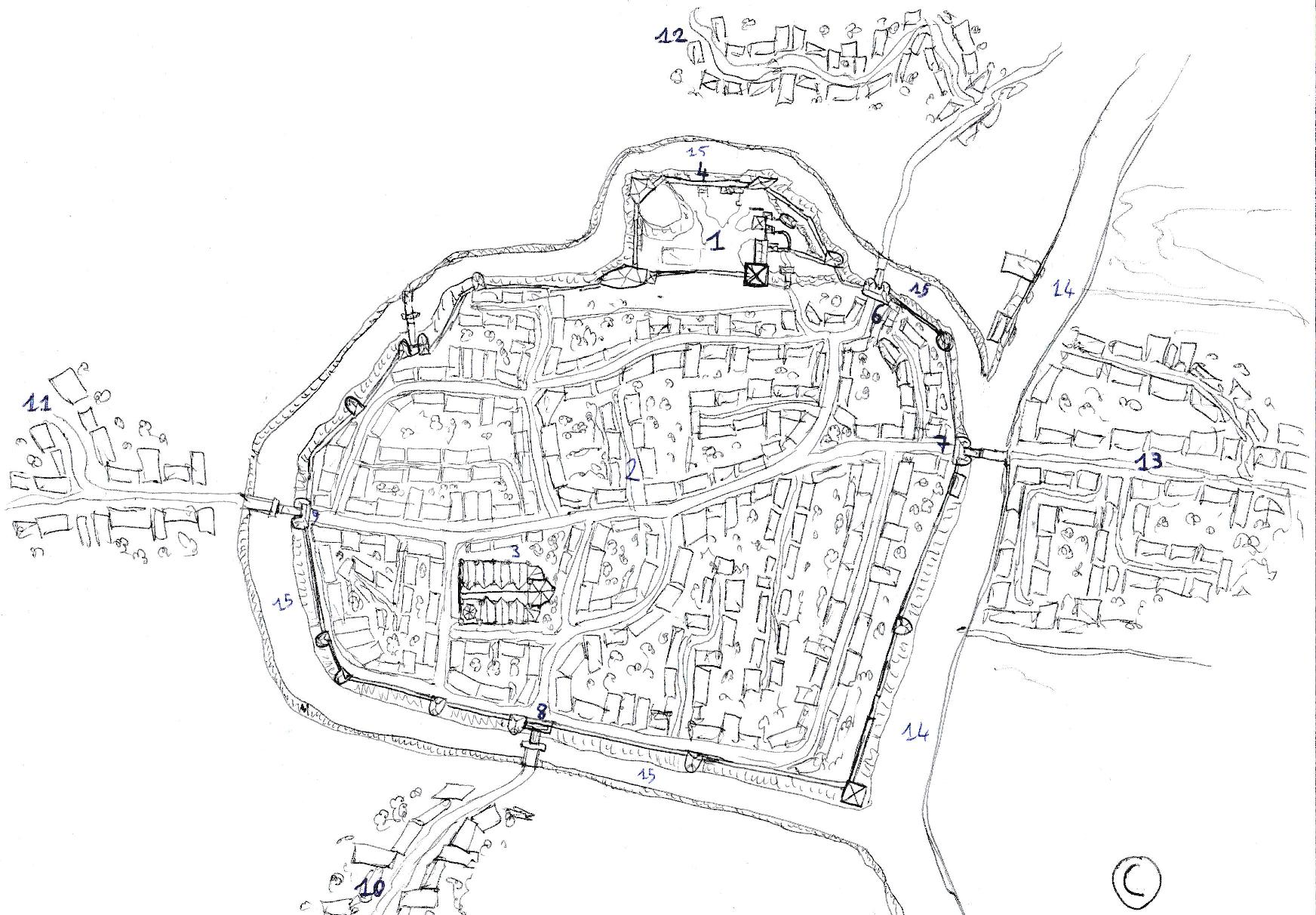 Plan représentant les fortifications et l'organisation urbaine de Fontenay-le-Comte au Moyen-Age.